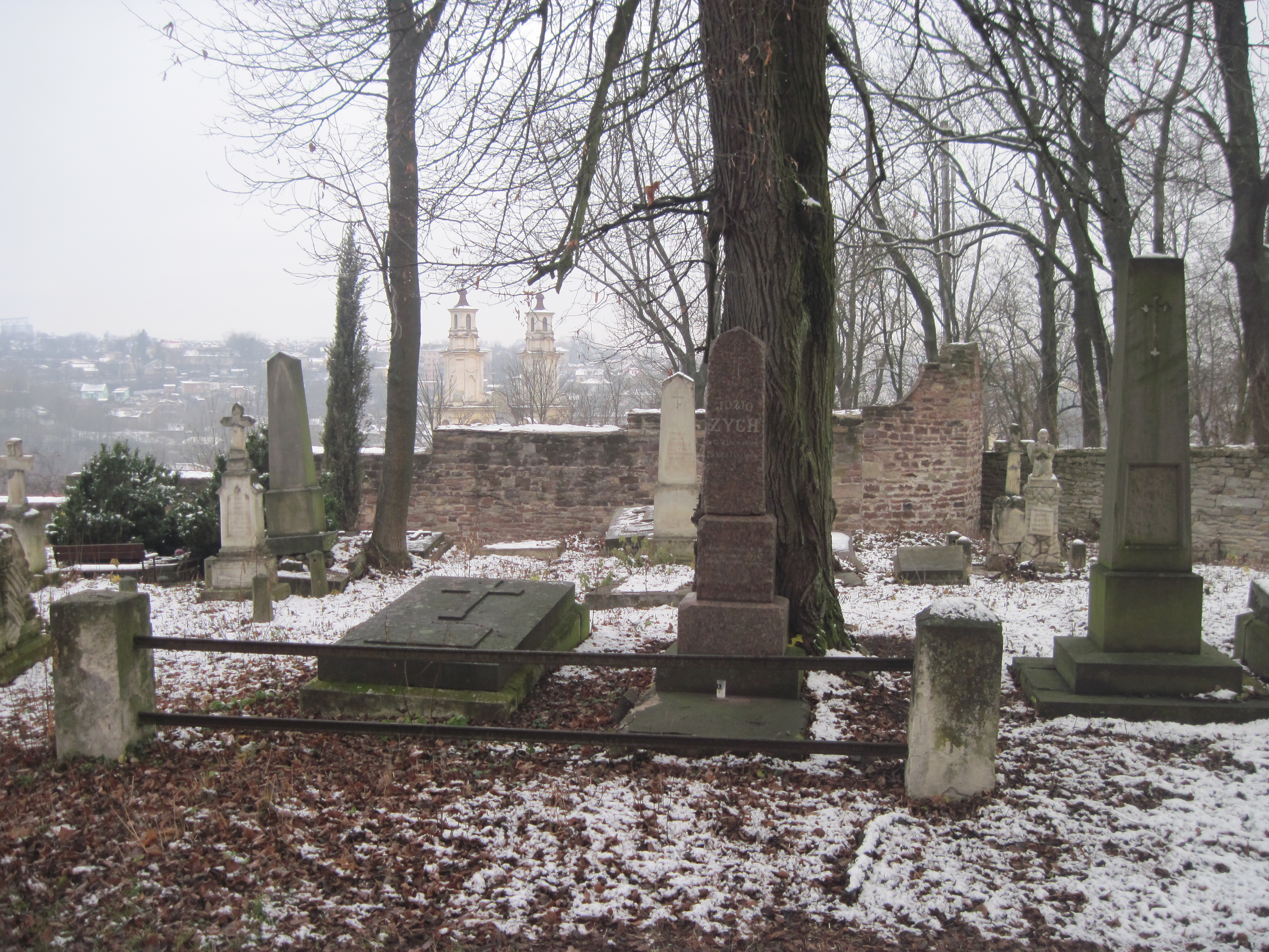 Могила Йозя Зиха (Jozio Zych) та Кароліни Шутт (Karolina Schuttowa) навпроти каплиці Потоцьких, Бучач, цвинтар на горі Федір